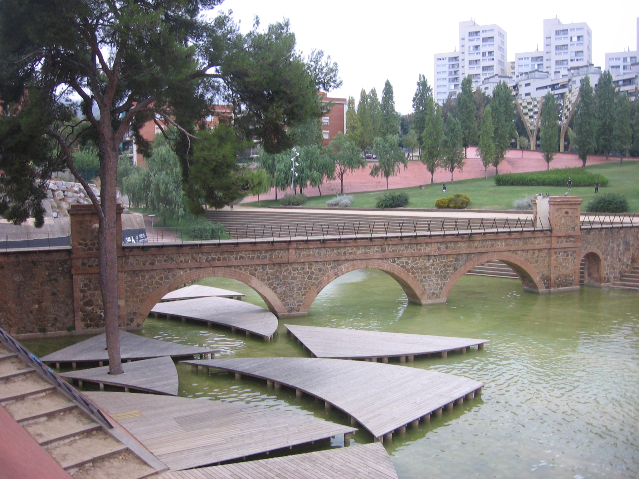 Parque Central de Nou Barris.